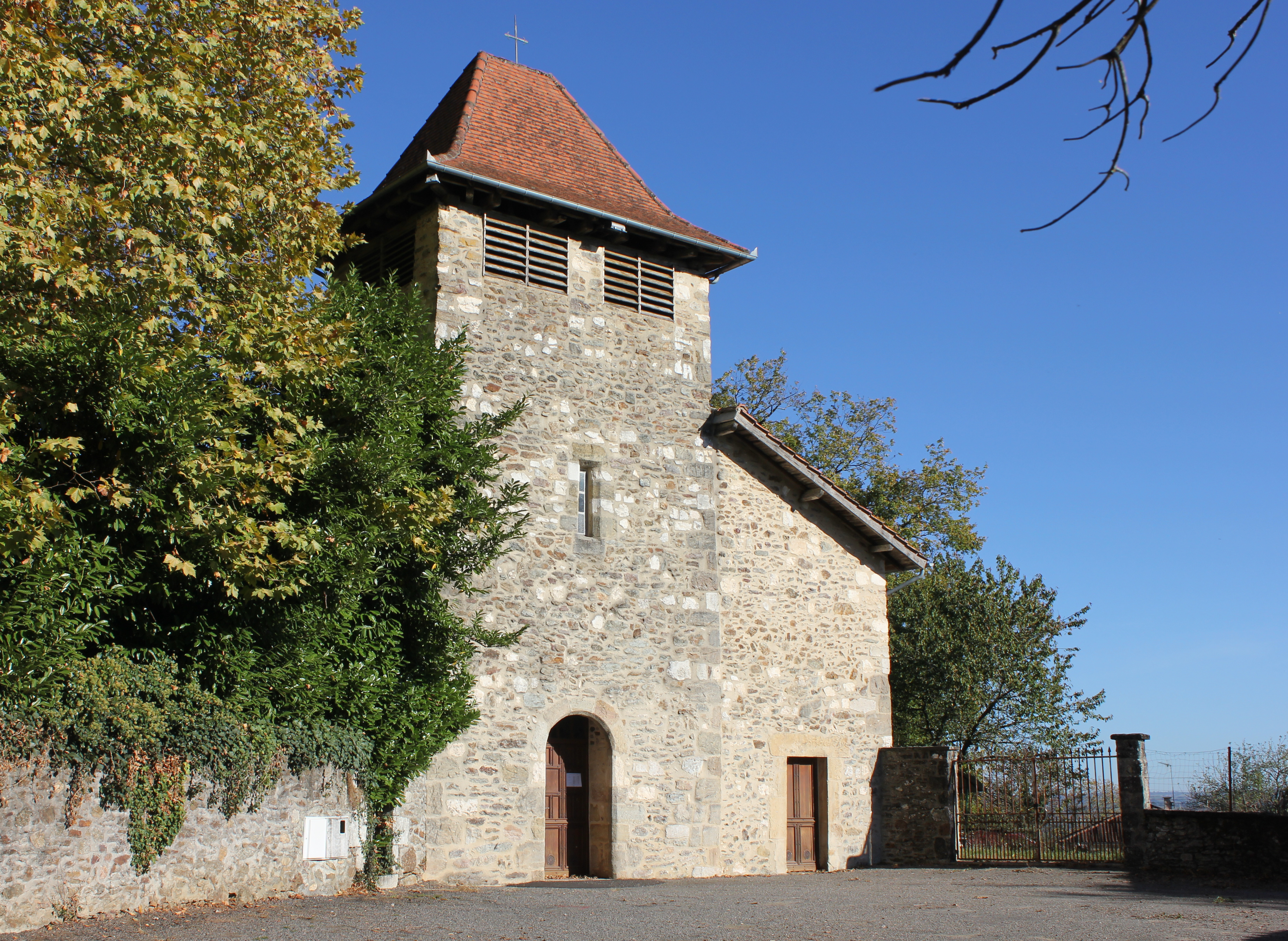 Église du village du Tioulou dans le Cantal